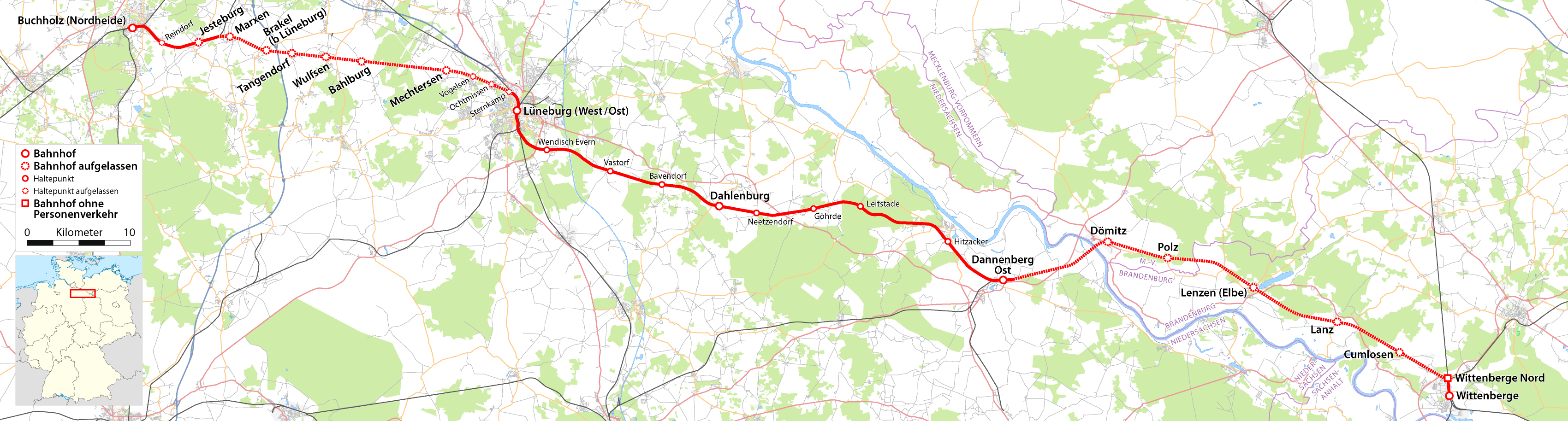 Karte der Bahnstrecke Buchholz-Wittenberge.